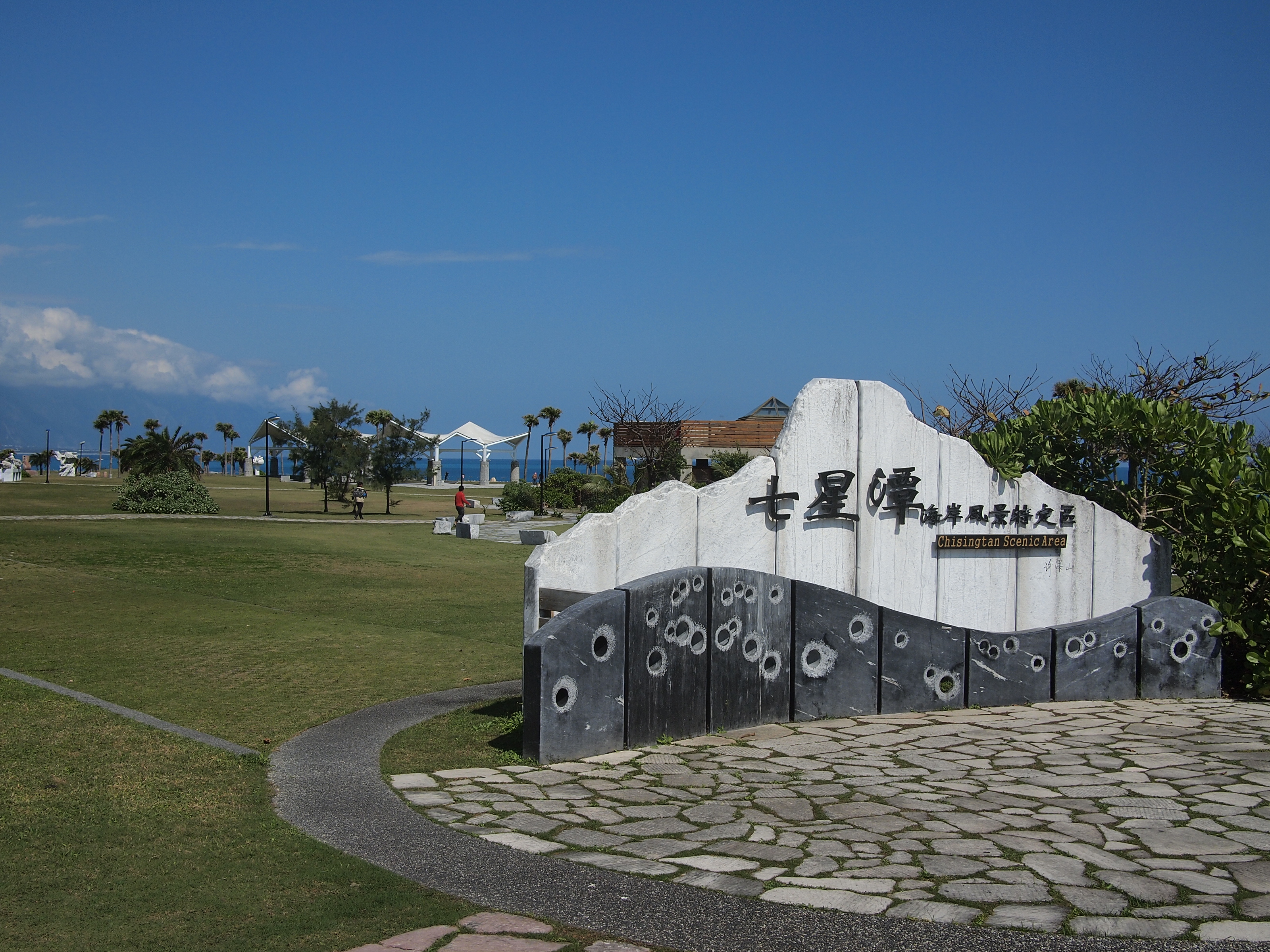 七星潭海岸風景特定區標示牌